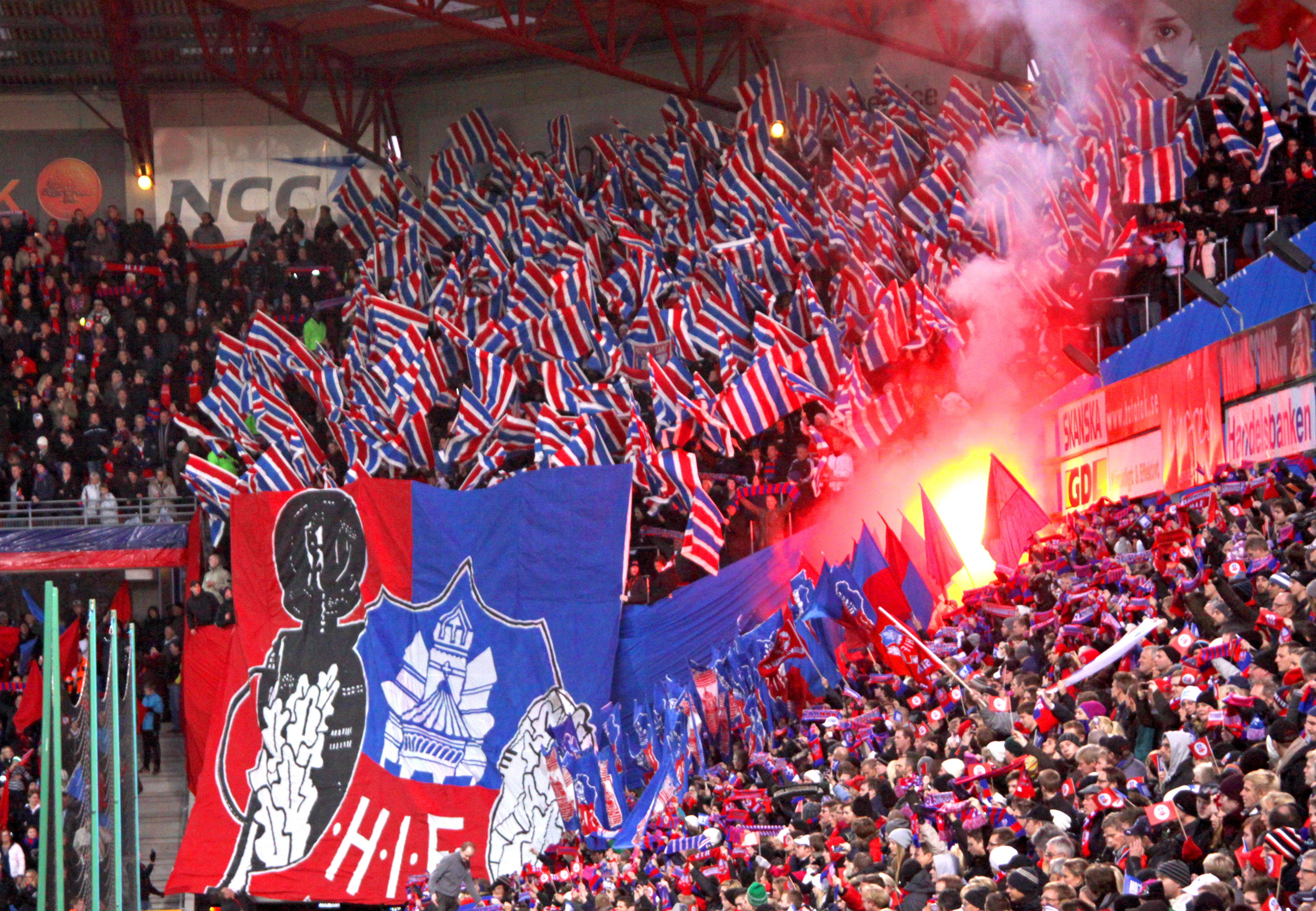 Helsingborg. HIF mot Kalmar FF på Olympia.